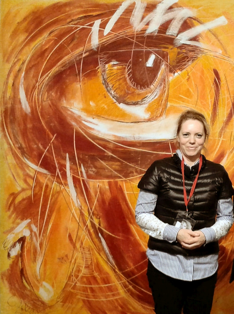 Alina Atlantis vor ihrem Bild 'Selbstseher'